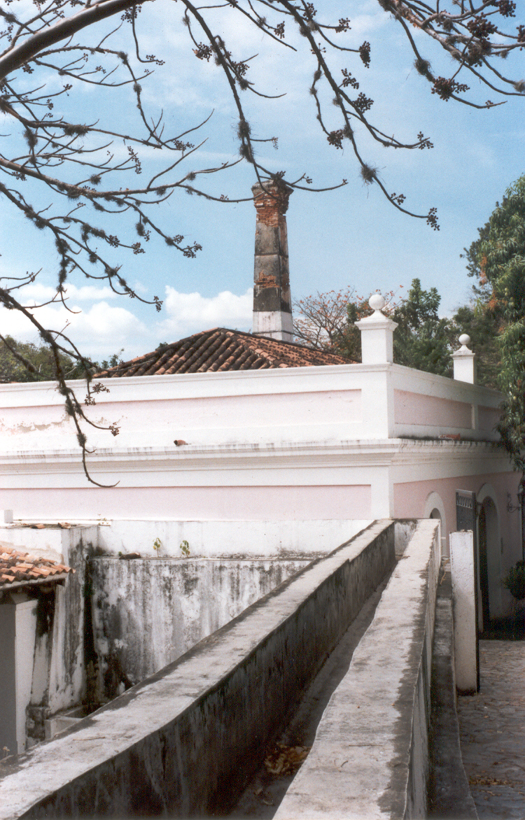 La Hacienda Bolívar de San Mateo (Estado Aragua, Venezuela) era una gran hacienda de caña de azúcar, con toda la infraestructura necesaria para procesar gran cantidad de caña con el objeto de producir azúcar y ron. Un canal visible en la foto, proporcionaba la energía mecánica para mover una rueda hidráulica la que, a su vez, molía la caña en el trapiche. La casona de la hacienda es ahora un interesante museo.